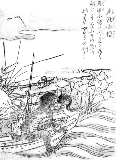 Gangi-kozō (岸涯小僧, a fish-eating water-monster) from the Konjaku Hyakki Shūi (今昔百鬼拾遺)